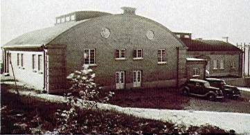 Bilden visar hur Görvälnverket såg ut 1937